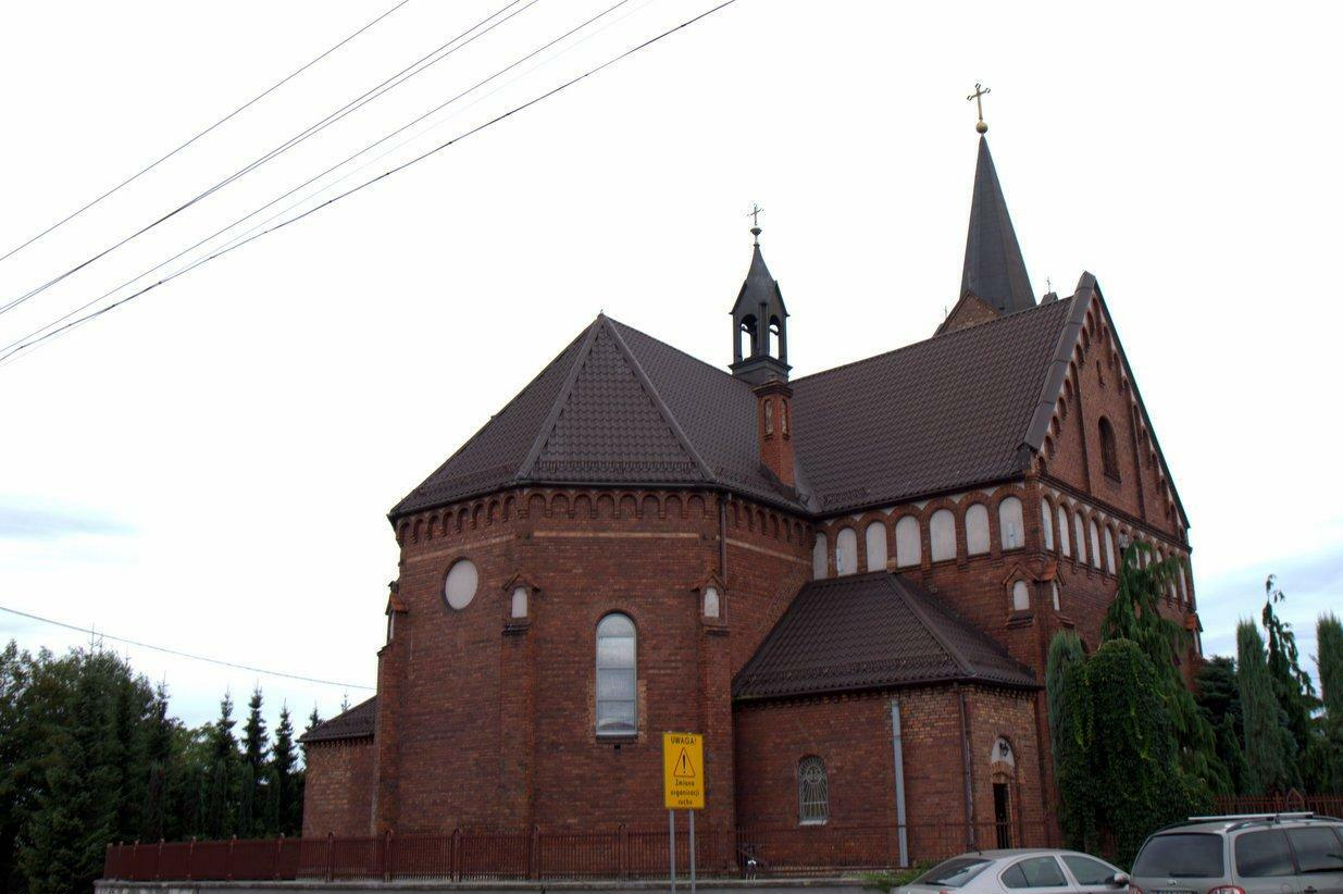 Kościół pod wezwaniem Św. Stanisława Biskupa i Męczennika.